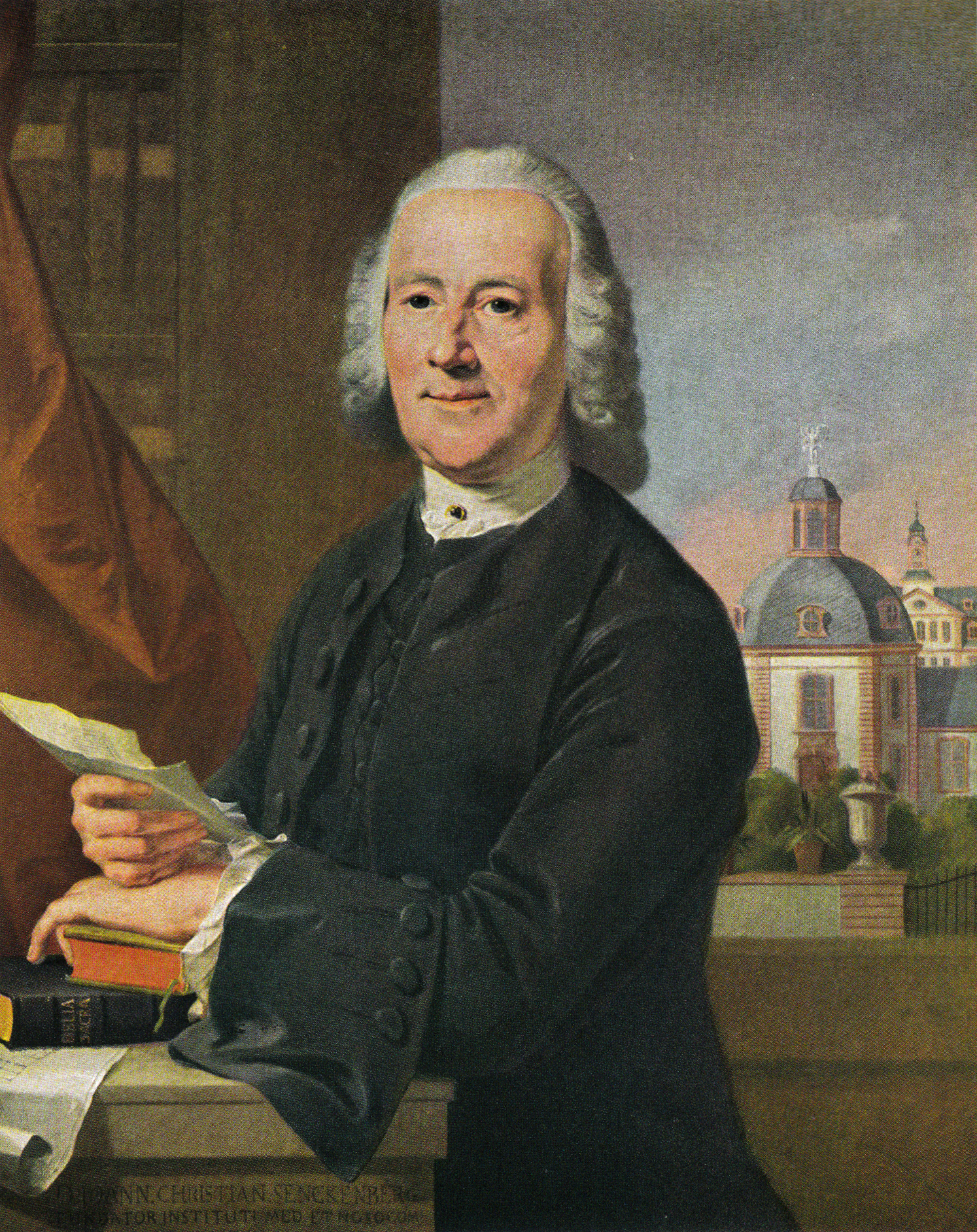 Bildnis des Johann Christian Senckenberg, im Hintergrund das Theatrum anatomicum und das Bürgerhospital